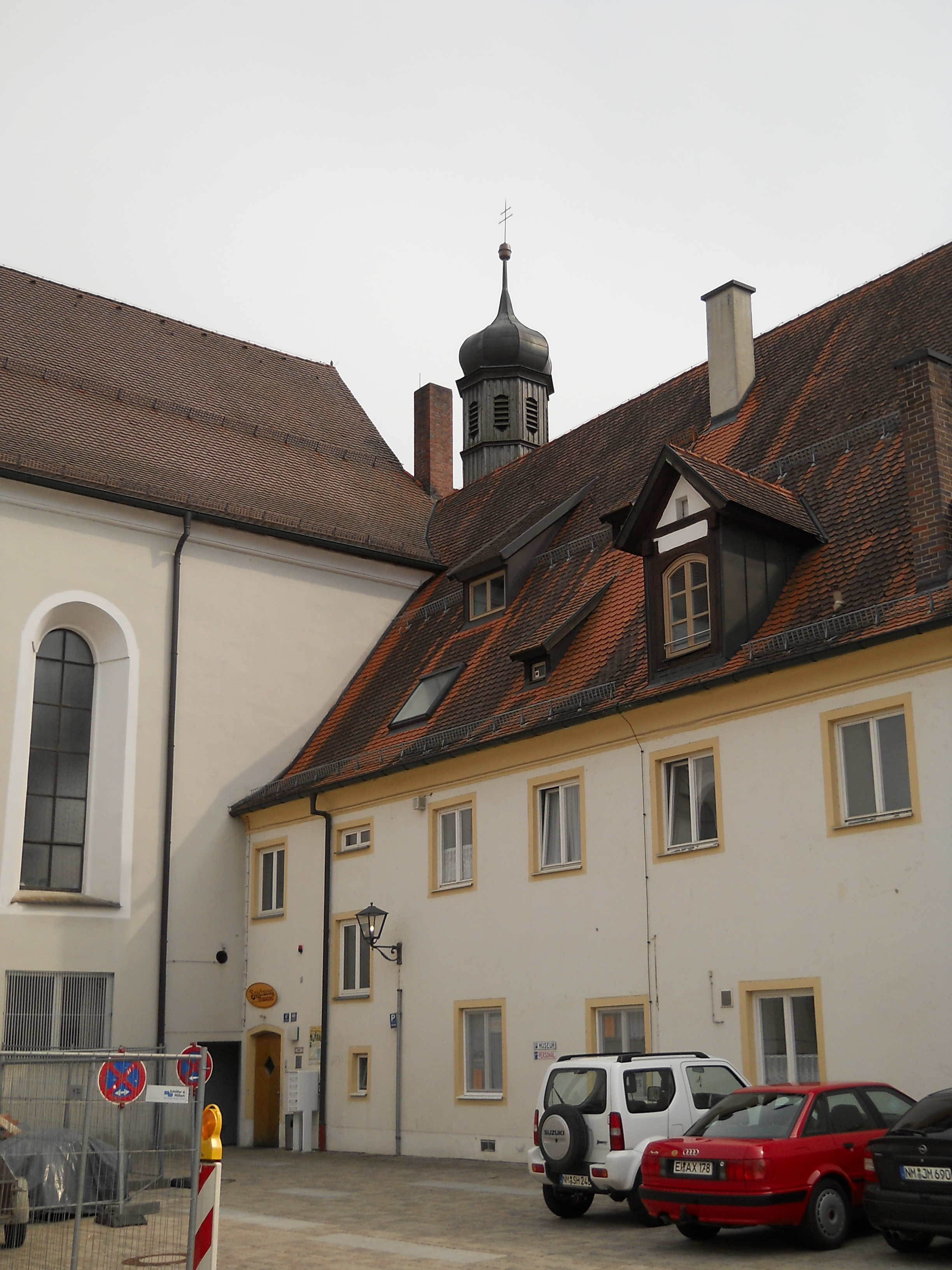 Das ehemalige Franziskanerkloster in Beilngries, Landkreis Eichstätt (Oberbayern)